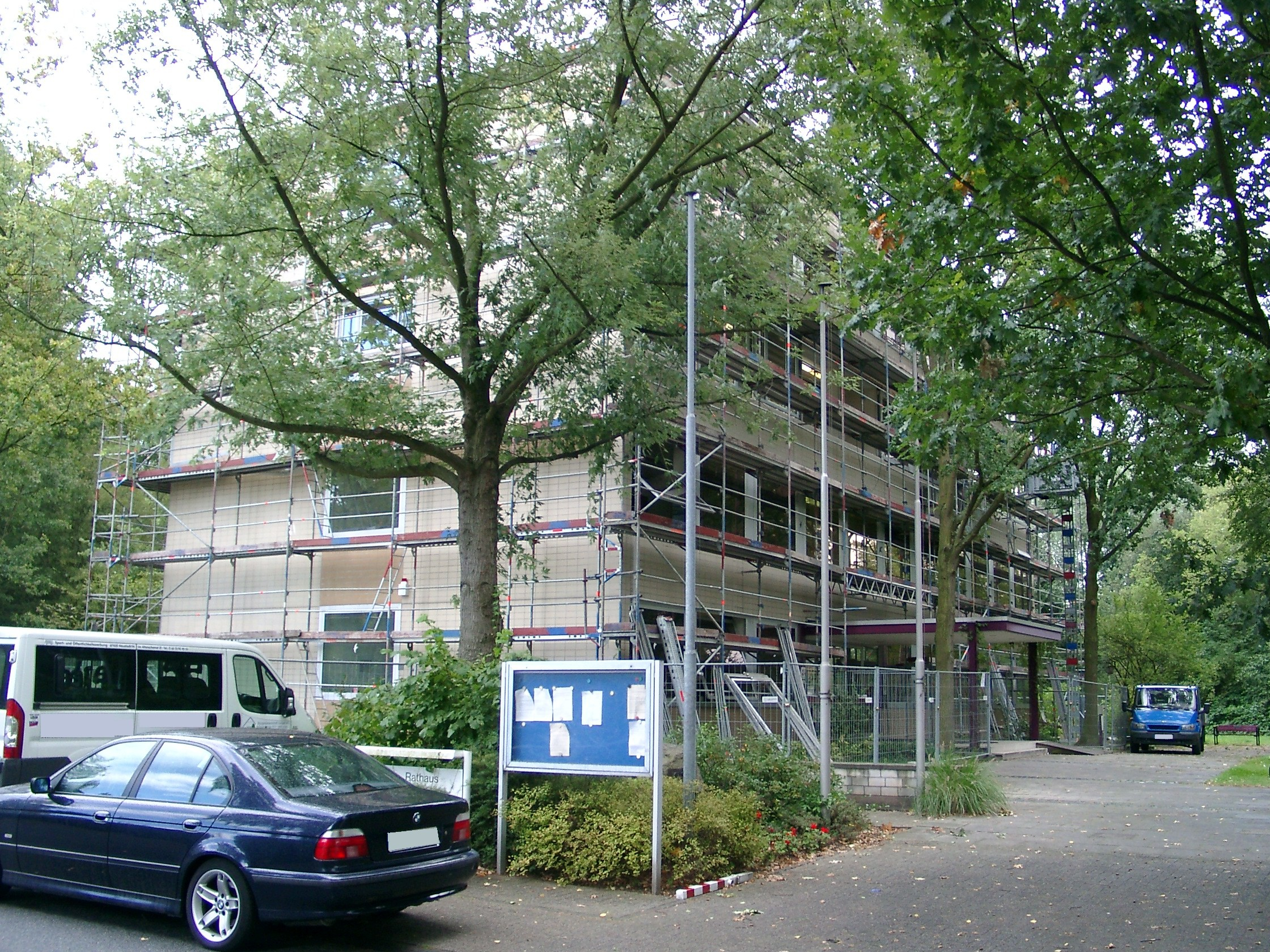 Egelsbach, Rathaus